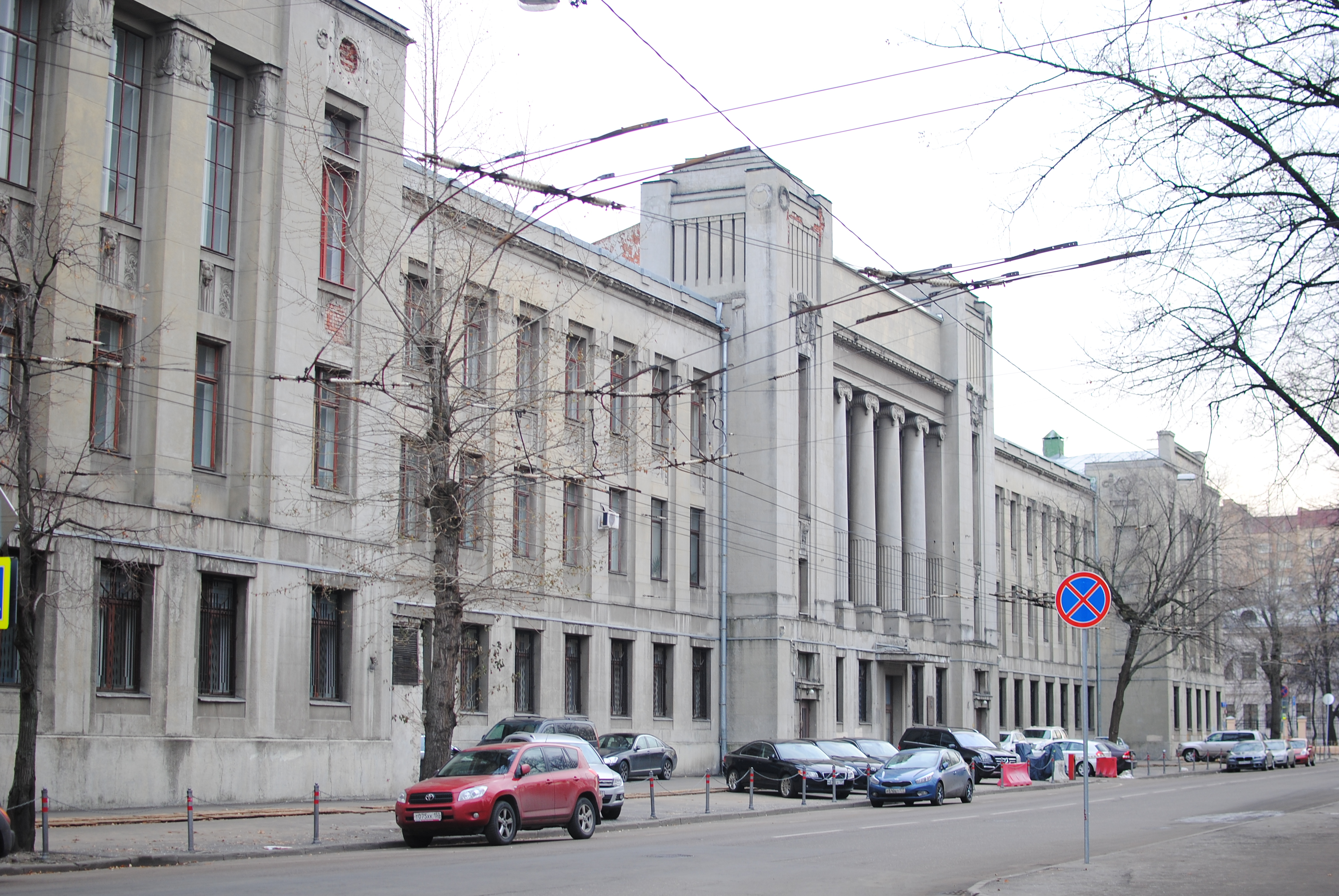 Народный университет им. Шанявского А. Л. (Москва и Московская область, Москва, Миусская площадь, 6, строение 7)